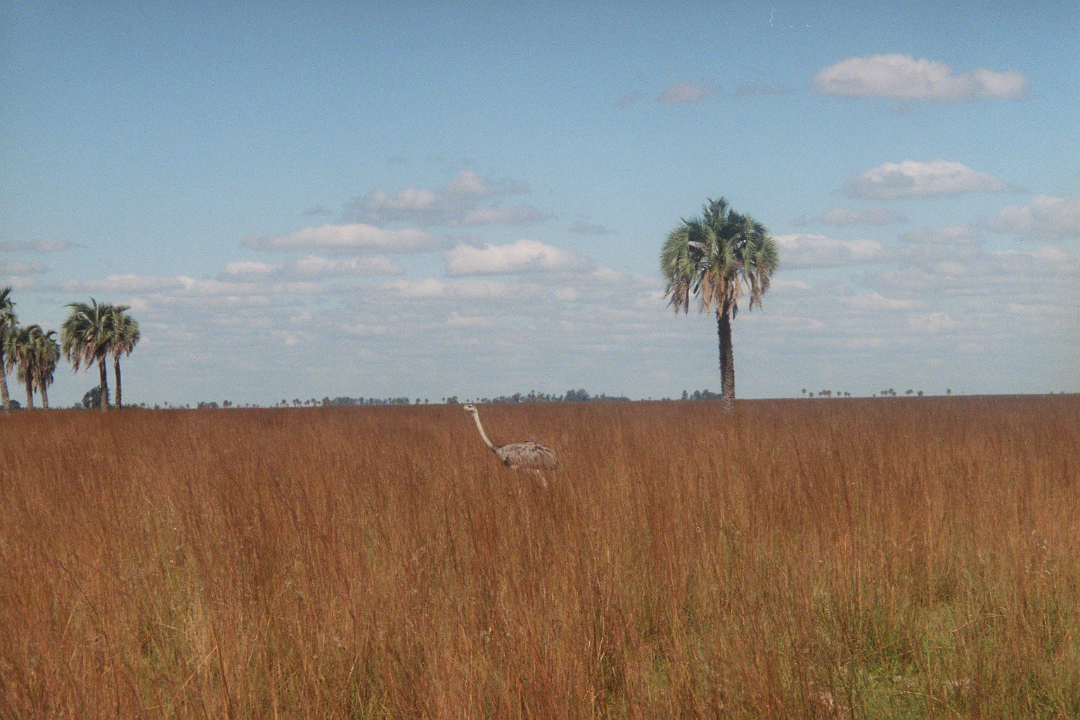 Ñandú (Rhea americana) en Mercedes Cossio, Goya, Corrientes, Argentina